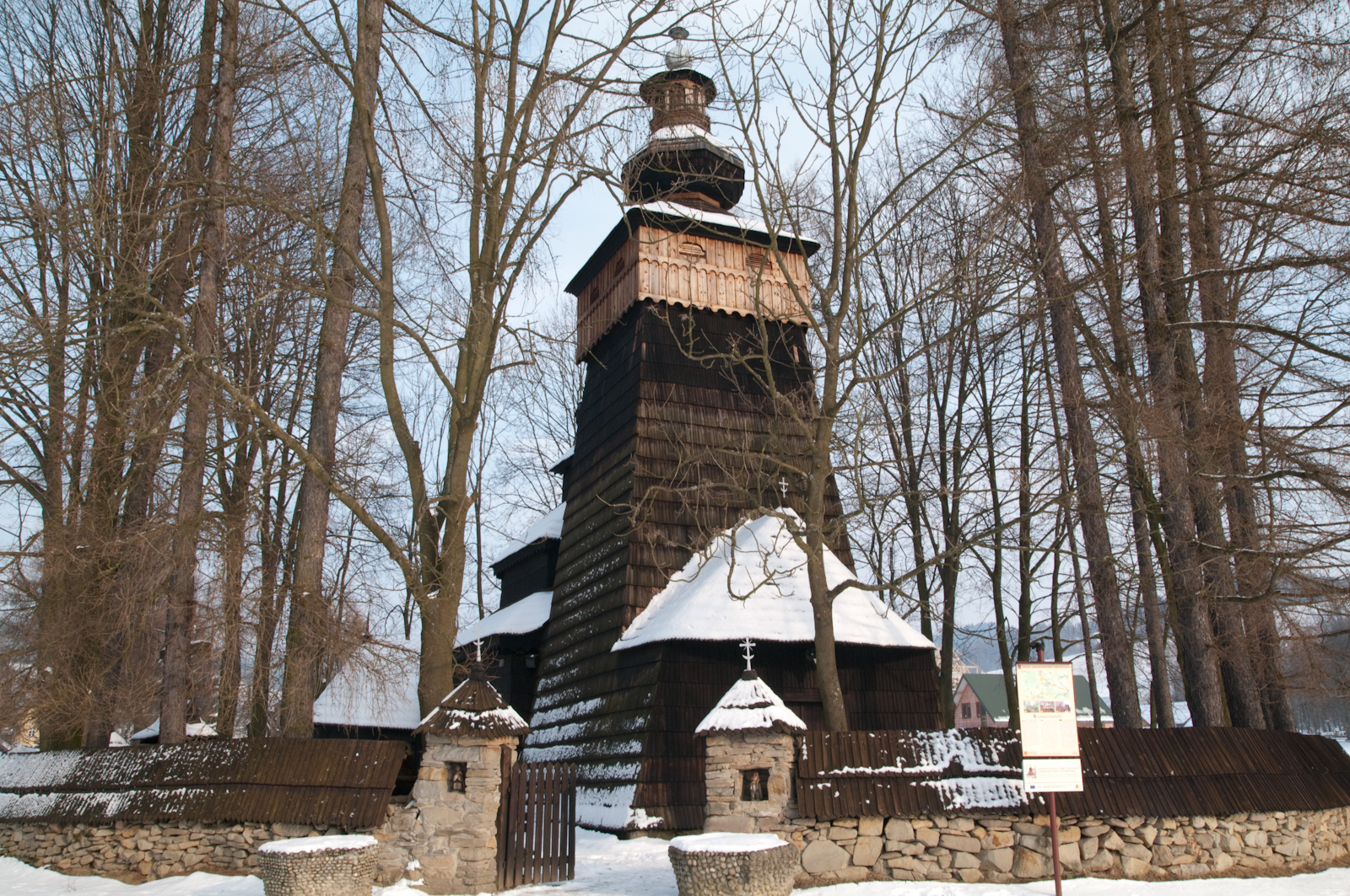 Cerkiew p.w. św. Jakuba (obecnie kościół p.w. św. Jakuba), widok od frontu Powroźnik, Muszyna